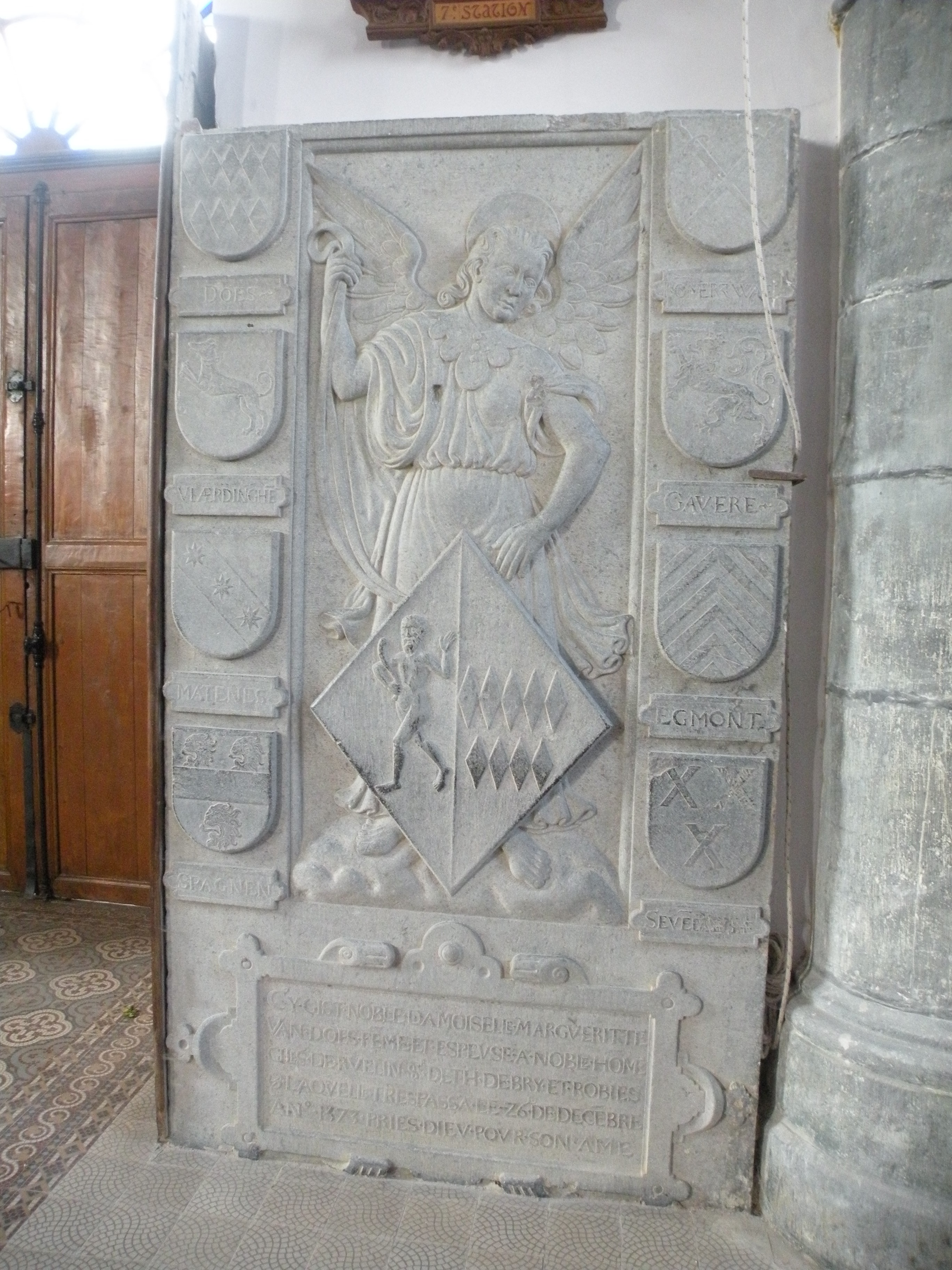 Église Saint-Denis d'Eth (Nord)